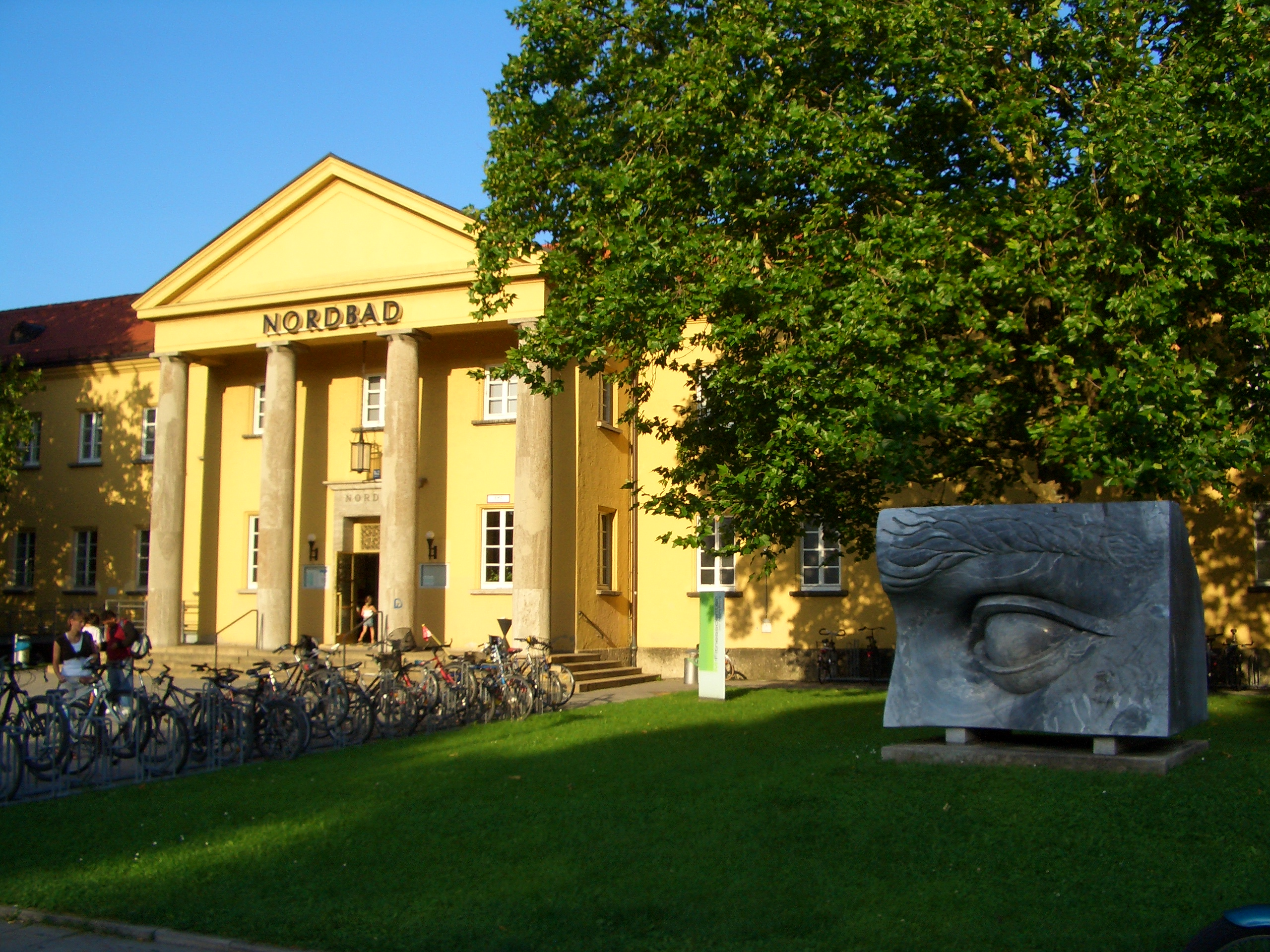 Nordbad München, Haupteingang, davor Skulptur von Anne und Patrick Poirier